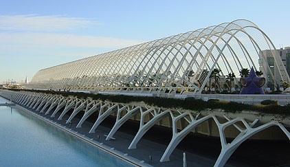 Bitki Müzesi ve Yürüyüş Yolu